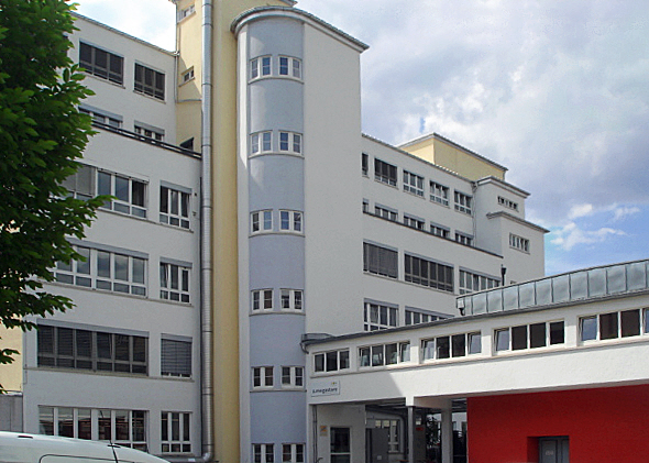 Das Kübler-Areal 2012.